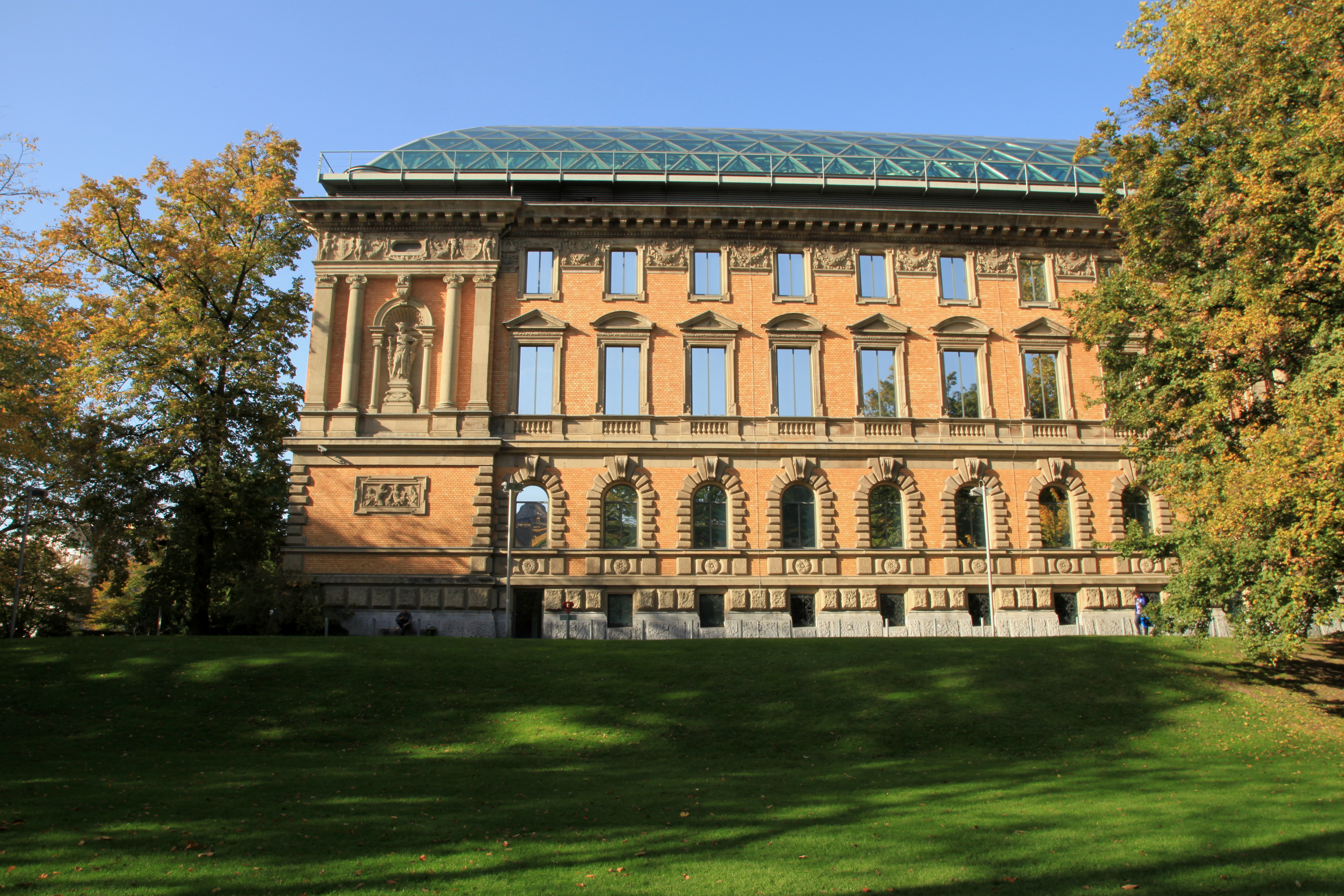 Ständehaus, Ständehausstraße 1 in Düsseldorf